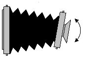 Balgenkamera mit schwenkbarem Objektiv